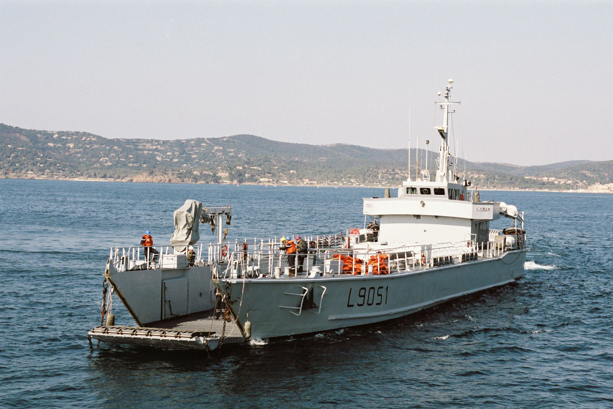 L'EDIC Sabre.